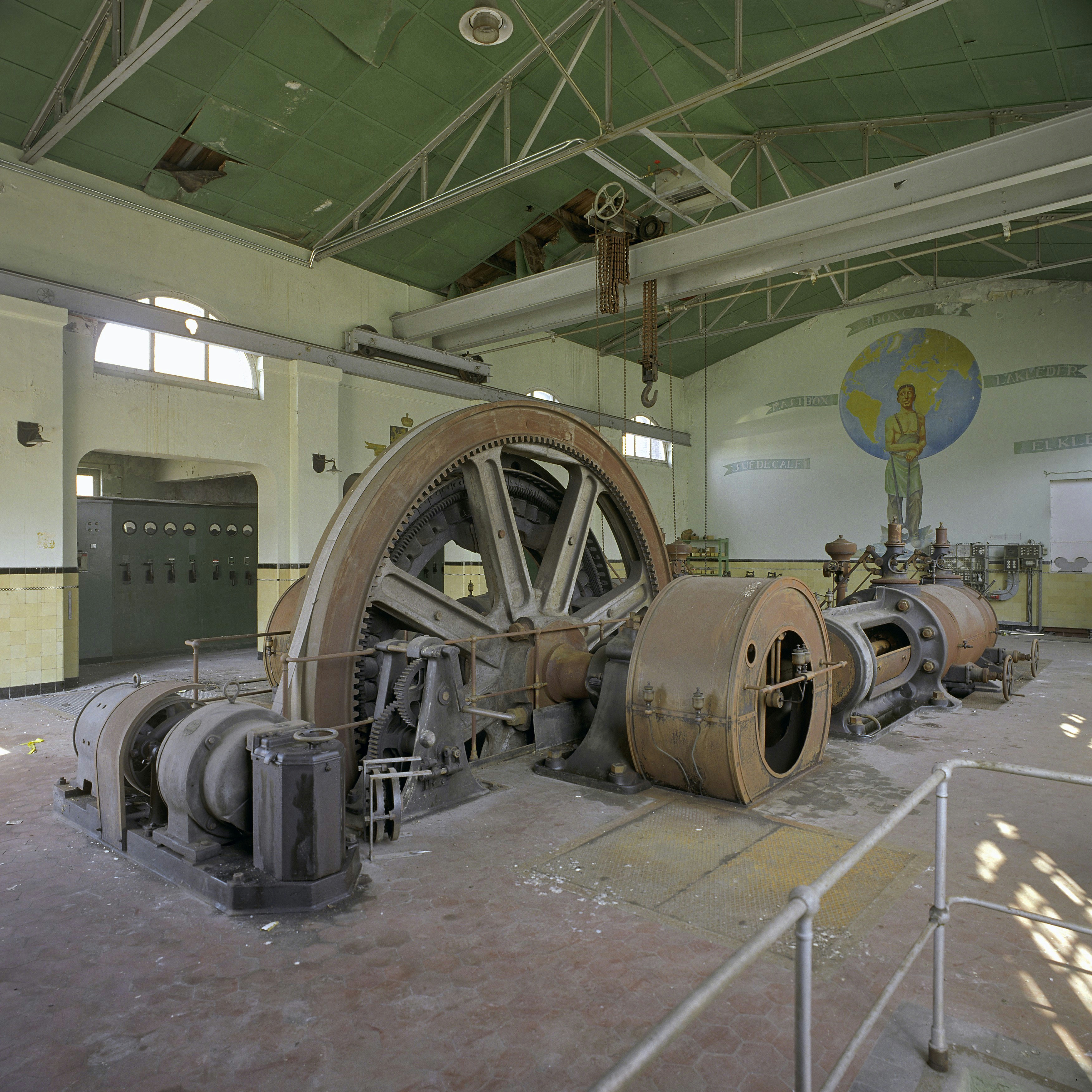 Koninklijke Verenigde Leder B.V. (Kvl): Interieur, overzicht hal met stoommachine en muurschildering